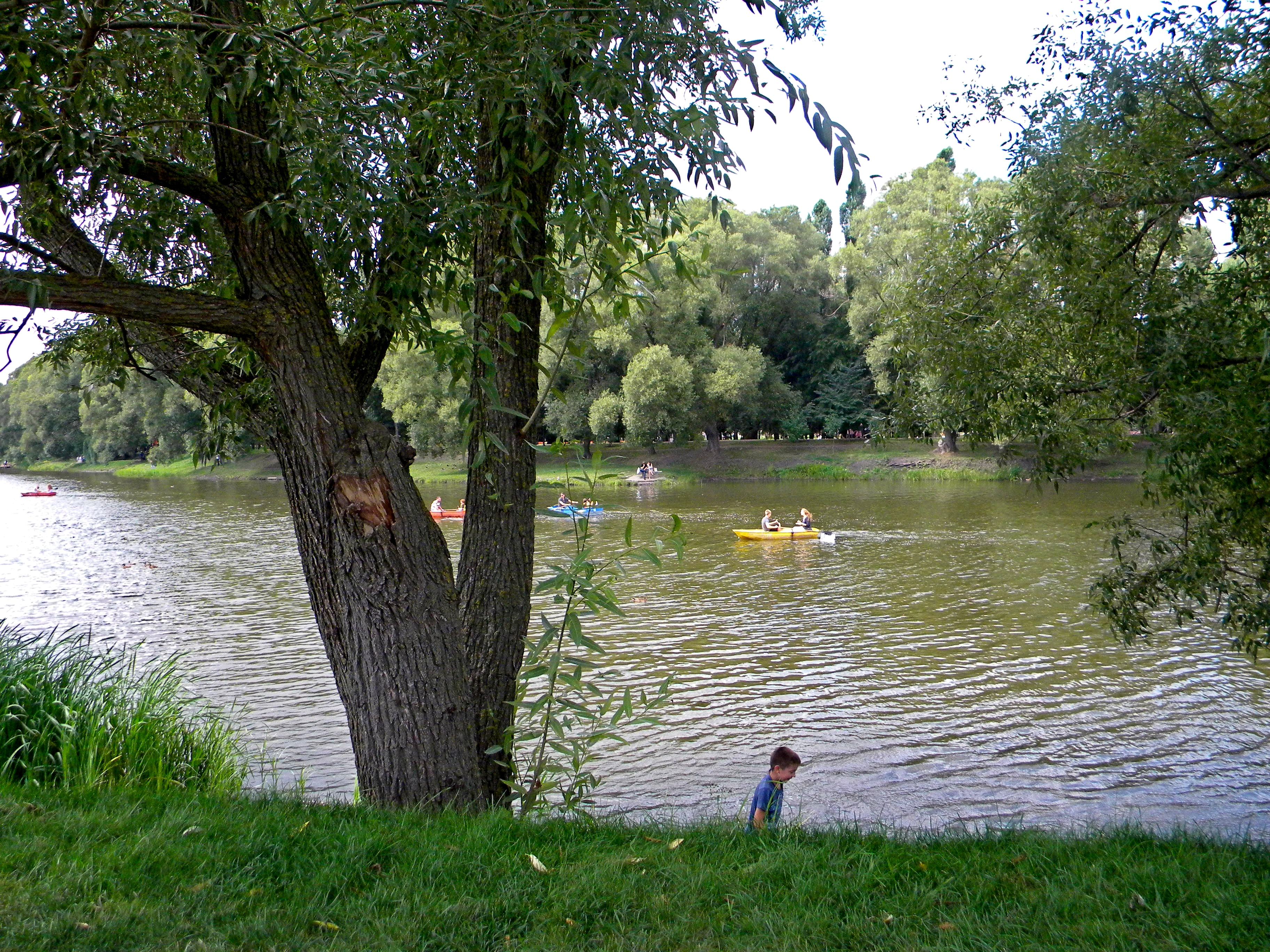 Река Везёлка в Белгороде